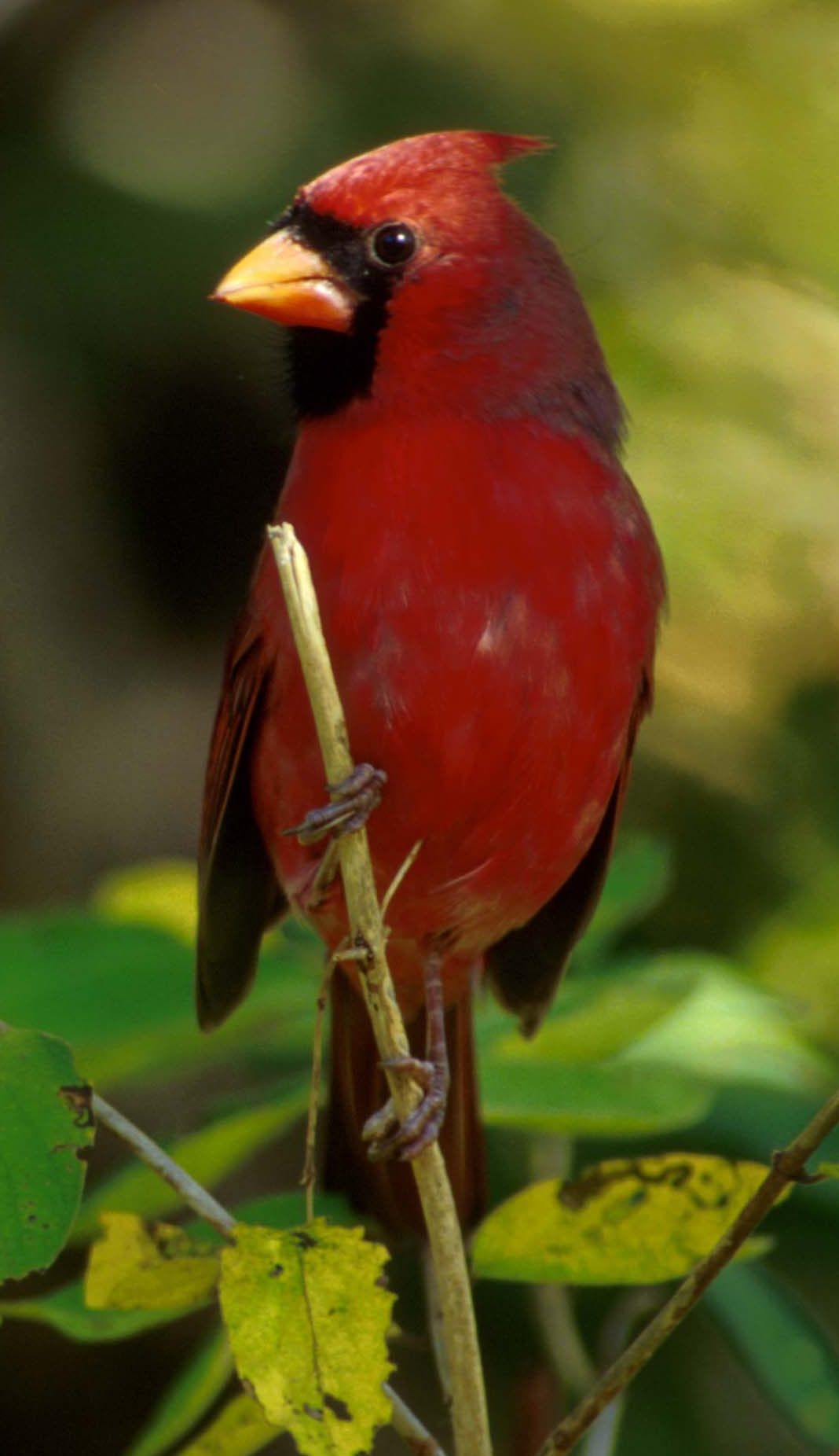 Beschreibung: Rotkardinal, Männchen (Cardinalis cardinalis) - "Cardinal, Morton National Wildlife Refuge, Rhode Island" Quelle: U.S. Fish and Wildlife Service, Digital Library System - verkleinert und zugeschnitten